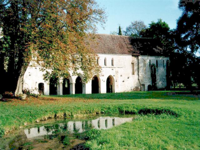 Vue générale de l'abbaye de Fontaine-Guérard